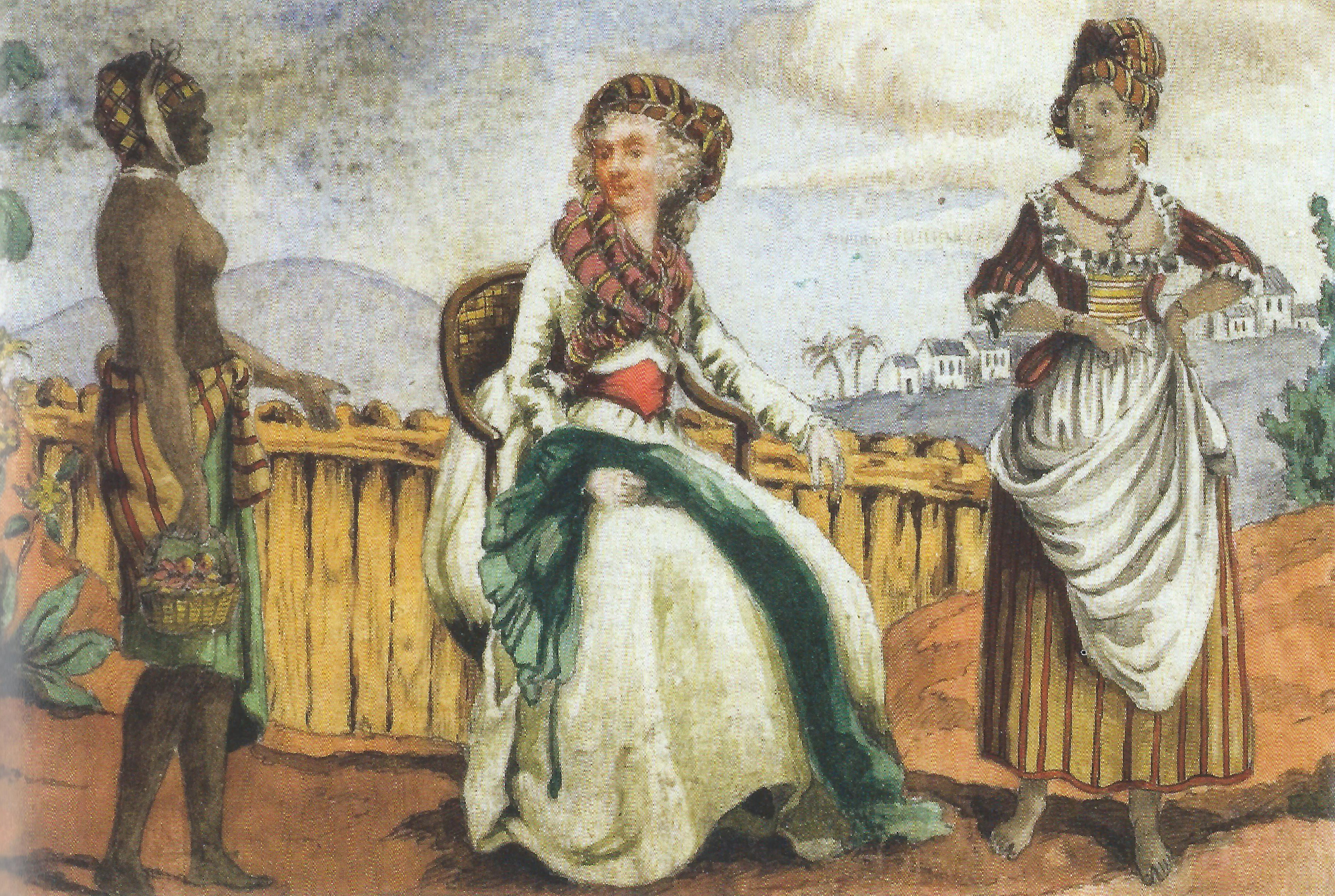 Madame Ailhaud, vêtue en créole, dans sa propriété de la Guadeloupe vers 1760